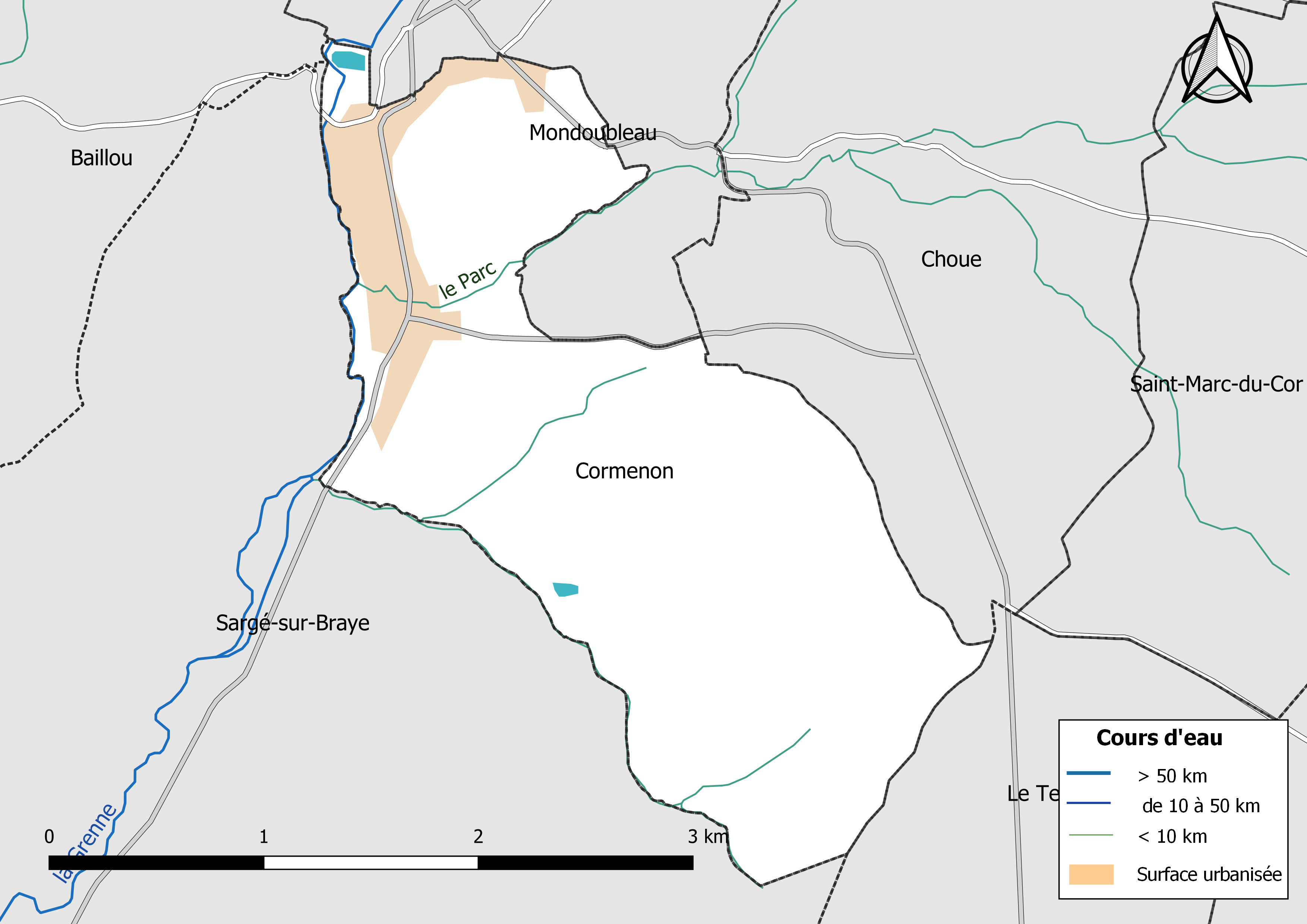 Carte du réseau hydrographique de la commune de Cormenon (Loir-et-Cher, France).